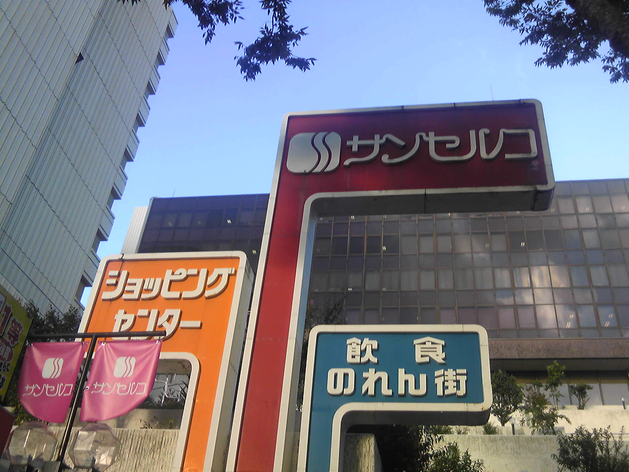 サンセルコの看板